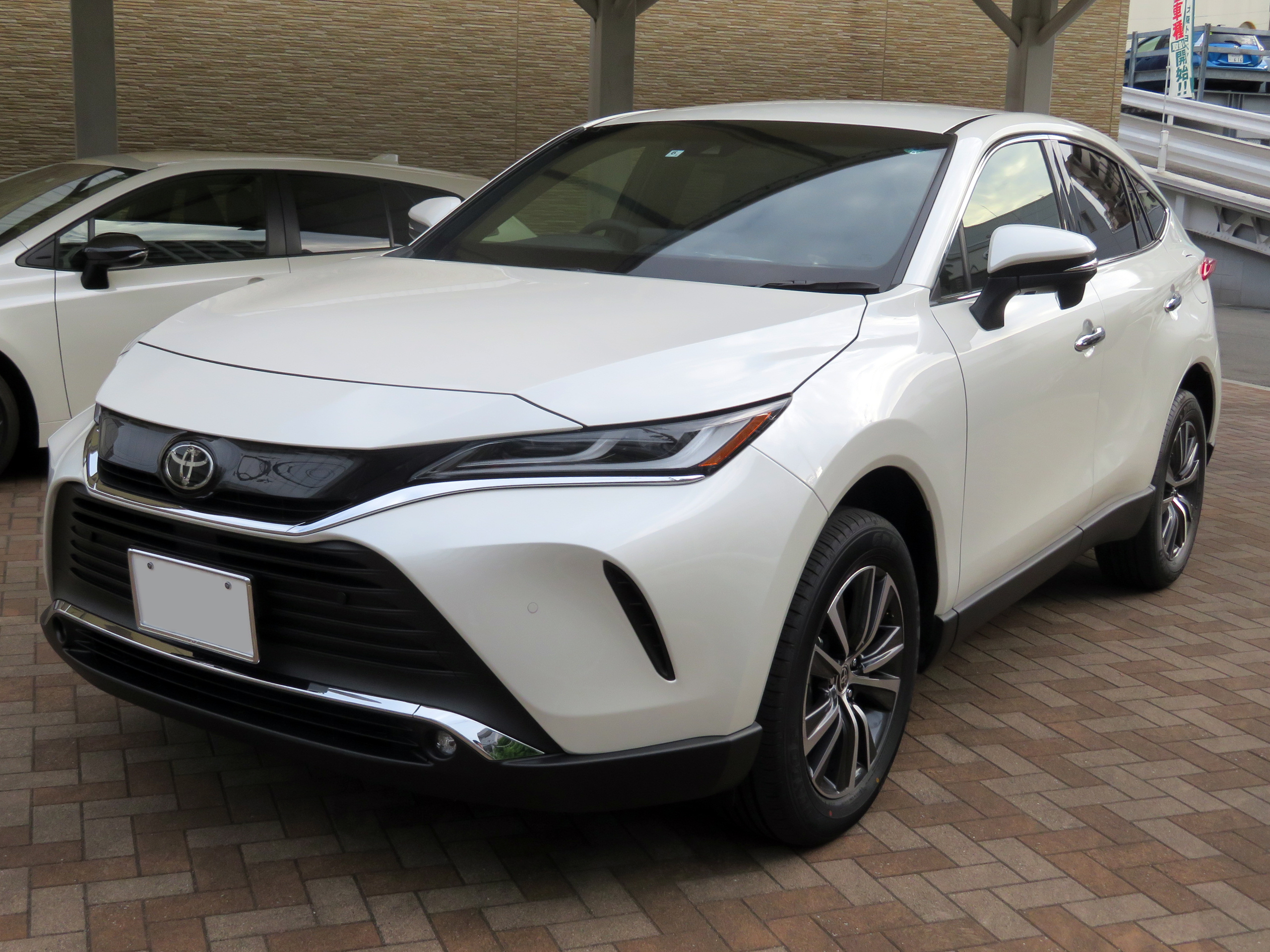 6BA-MXUA85-ANXGB型トヨタ・ハリアーG 4WDを撮影。